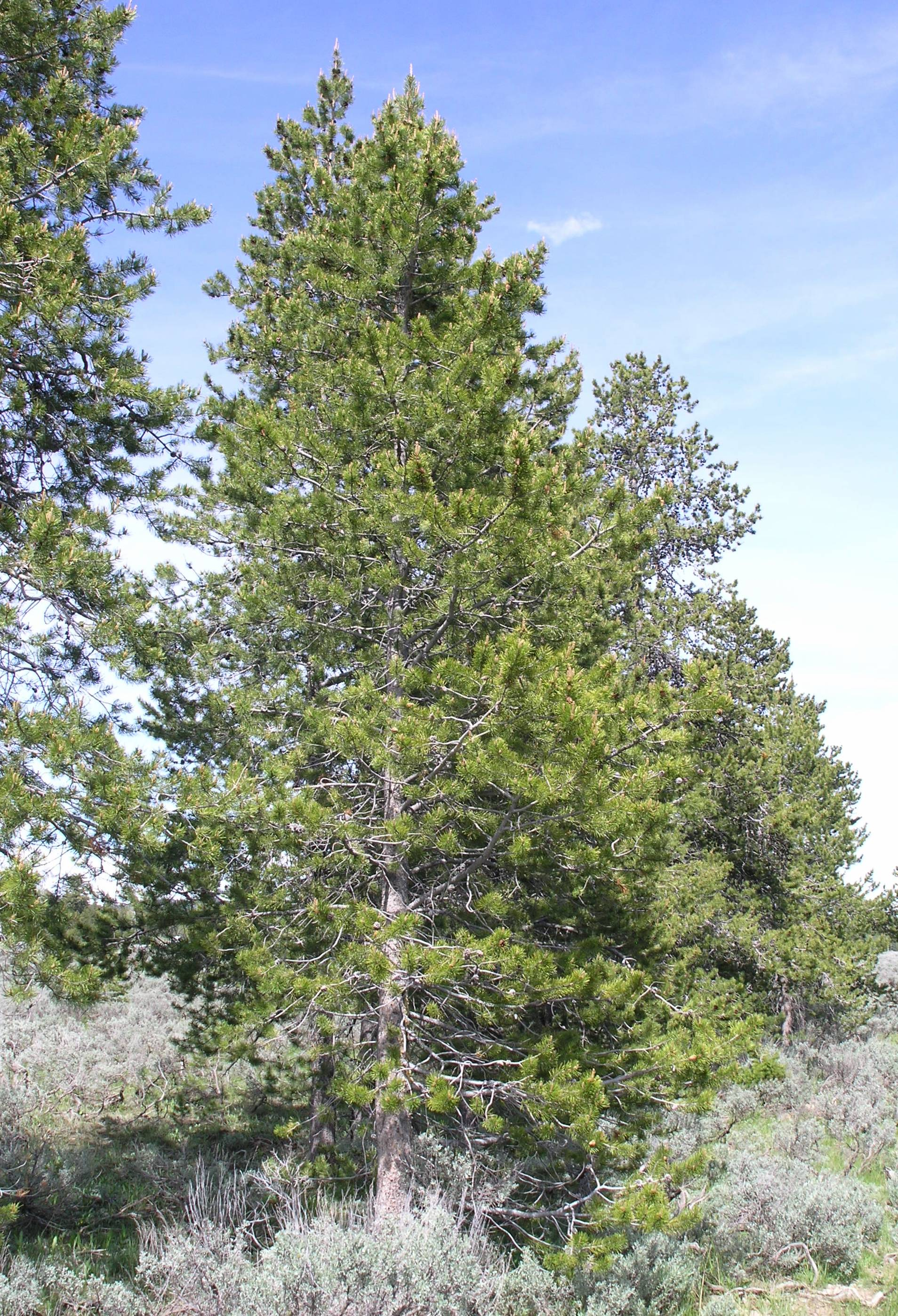 Lodgepole Pine Pinus contorta